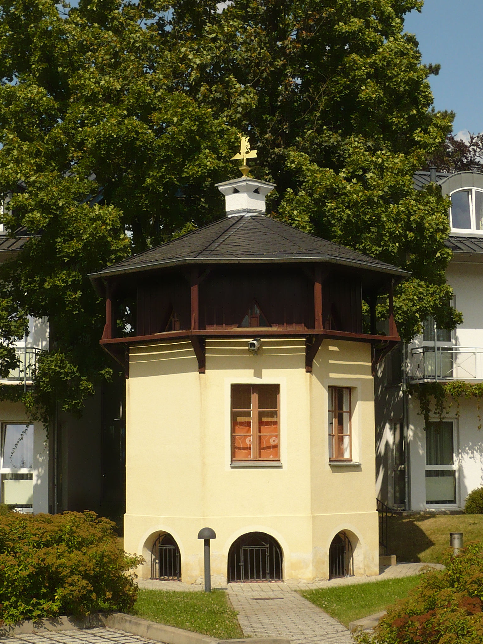 Zabytkowy obiekt w Neukirchen Pleiße